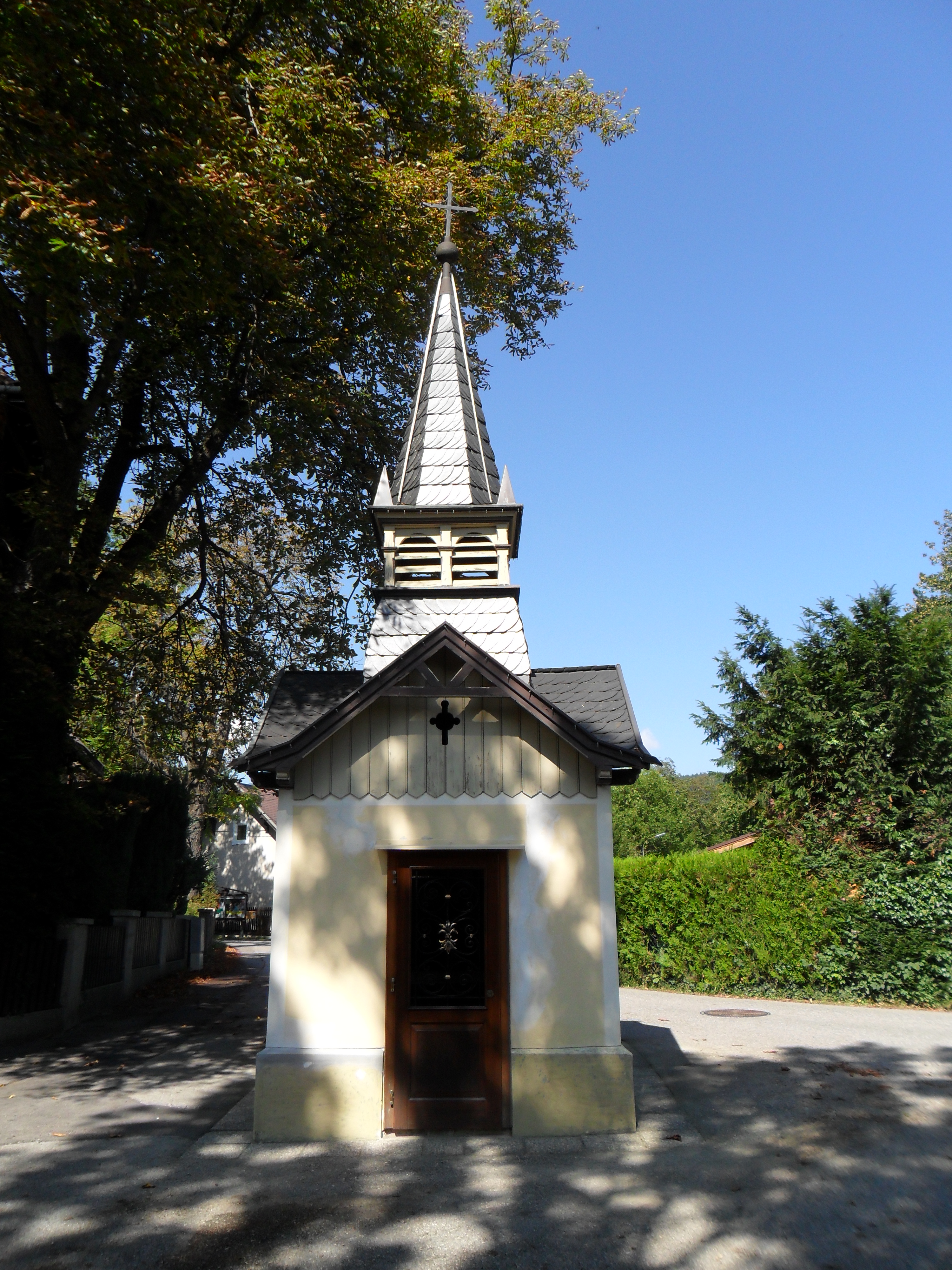 Liebfrauen-Kapelle in Hart (Gemeinde Enzenreith)